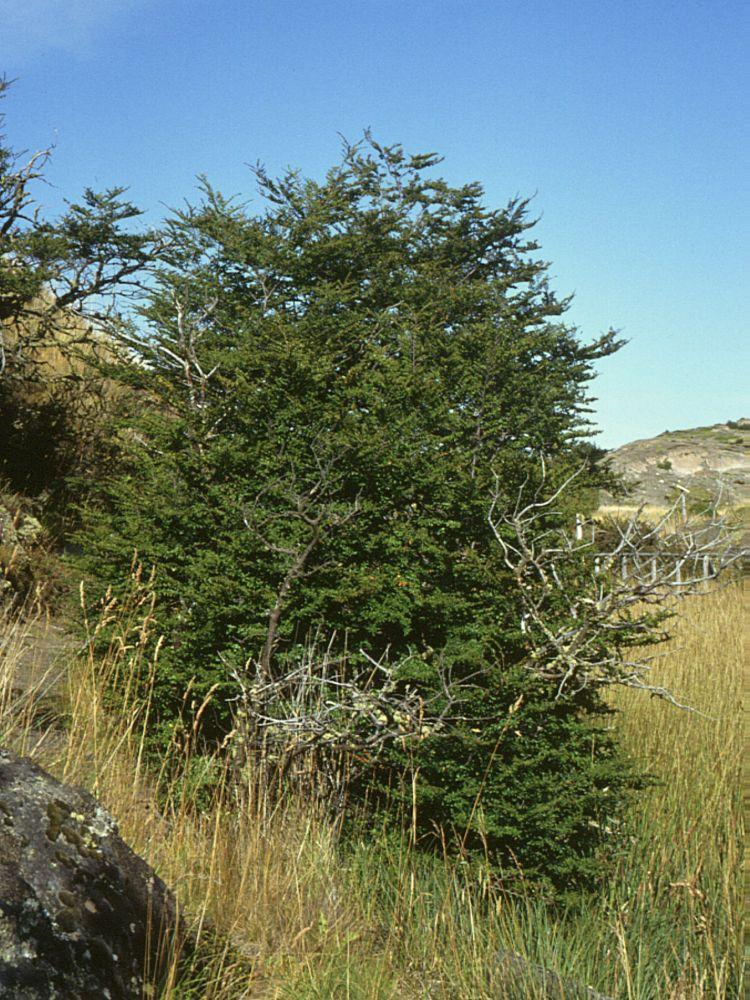 Antarktische Scheinbuche (Nothofagus antarctica), Scheinbuchengewächse (Nothofagaceae) - Chile, Patagonien/Patagonia, Parque Nacional Torres del Paine, bei Posada Río Serrano